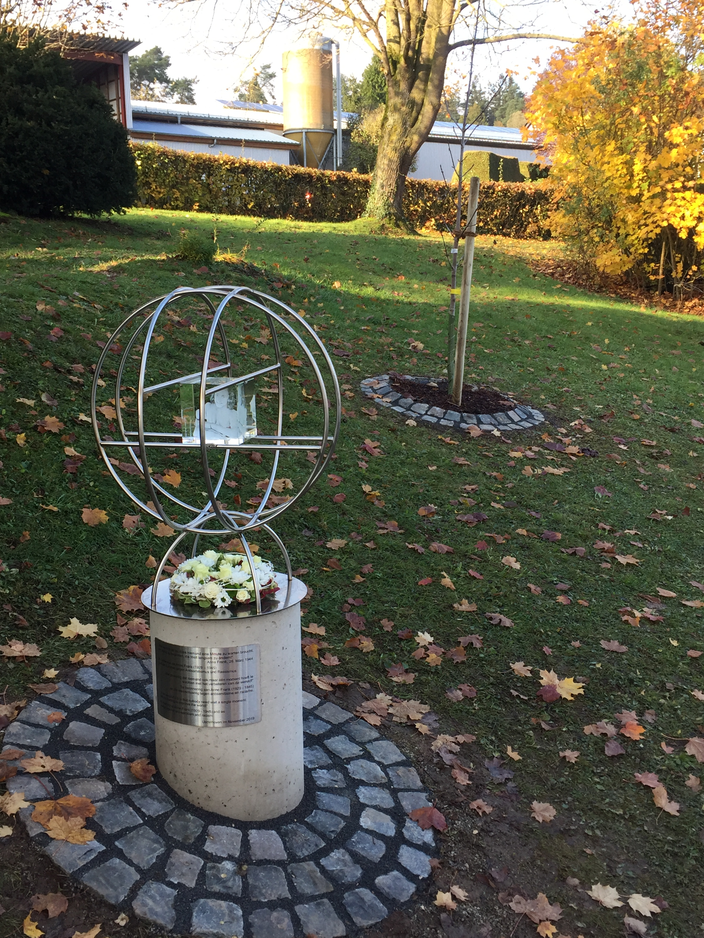 Anne Frank Baum und Anne Frank Skulptur